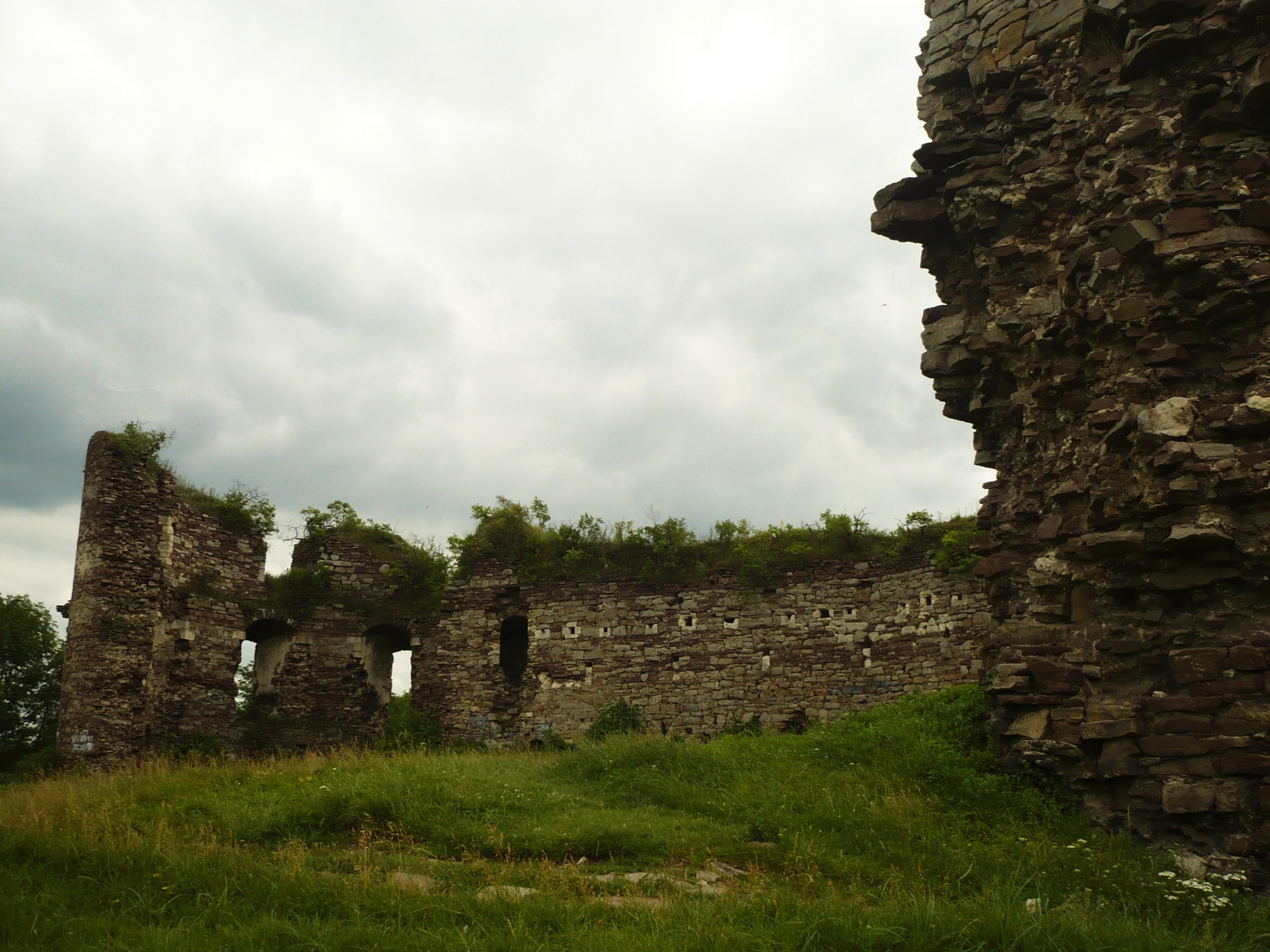 Buczacz. Zamek